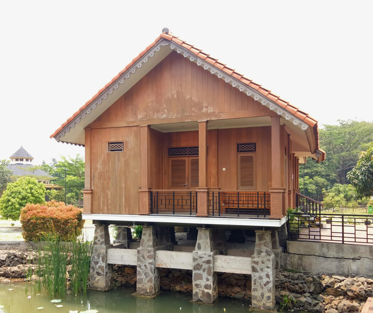 Ini adalah foto salah satu rumah adat yang ada di Indonesia, yaitu rumah adat kebaya yang berasal dari provinsi Jakarta. Rumah adat kebaya berbahan dasar kayu. Atap dari rumah adat kebaya berbentuk pelana.